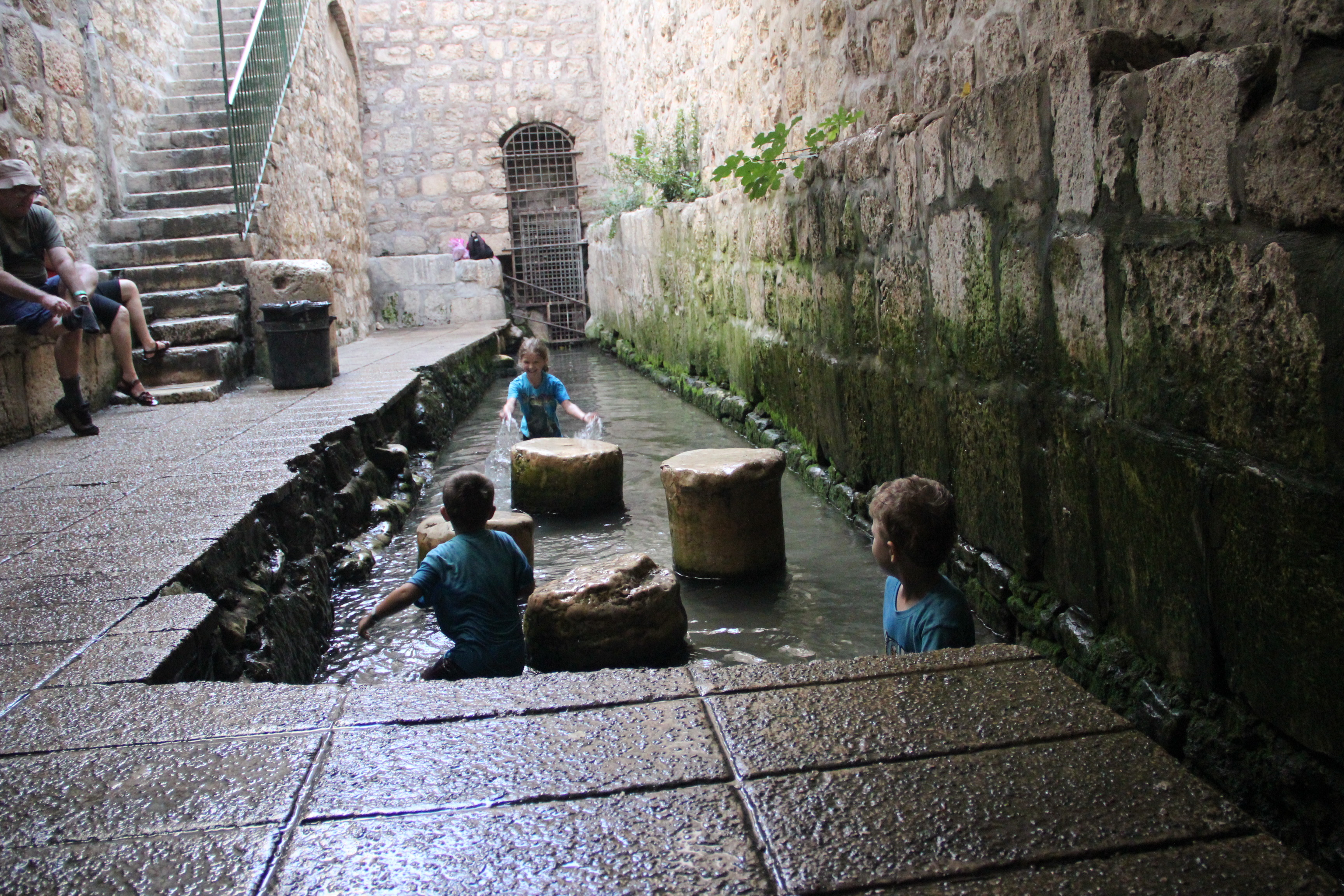 נקבת השילוח, עיר דוד